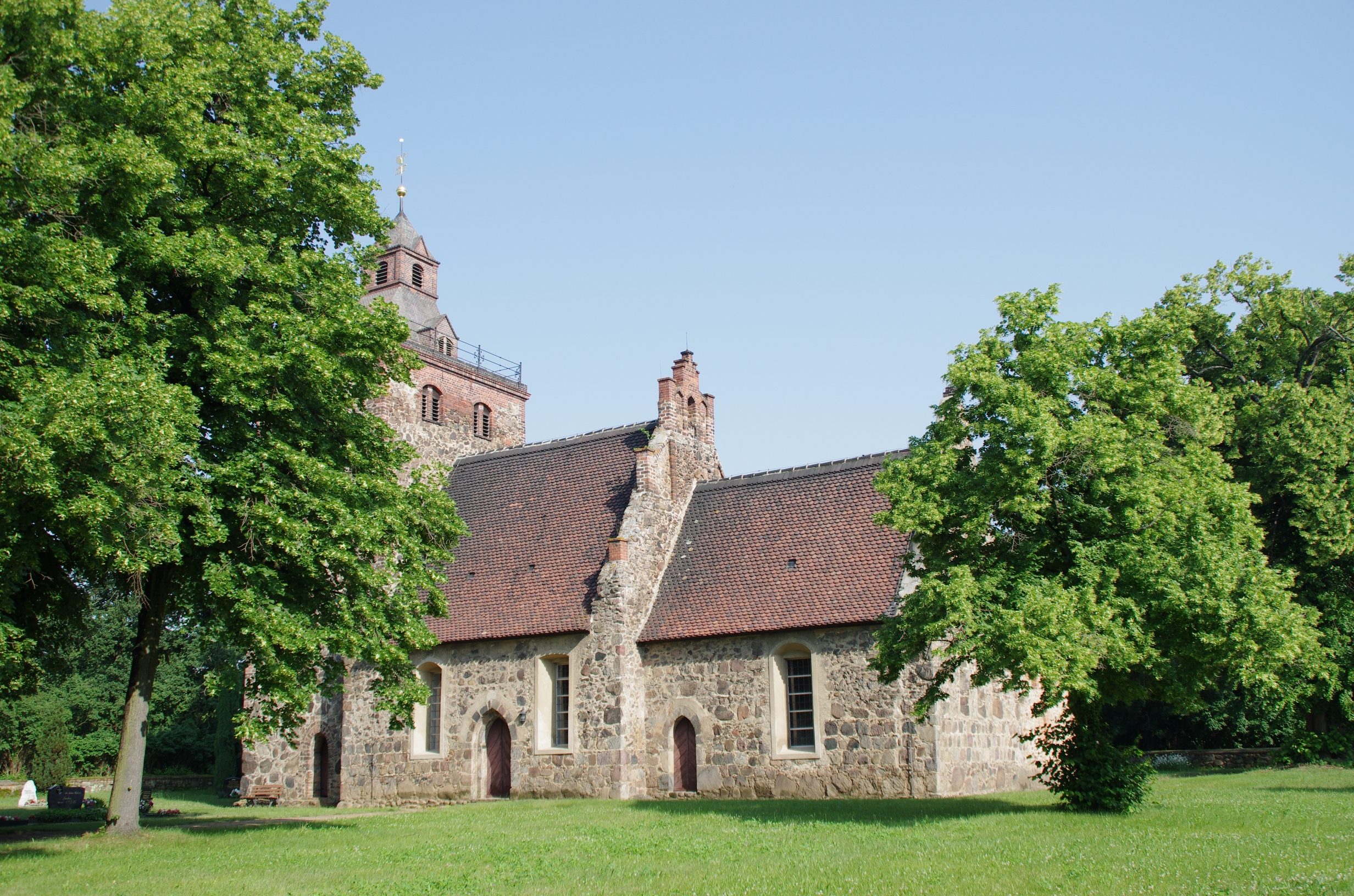 Luckau in Brandenburg.Kirche in Paserin steht unter Denkmalschutz.